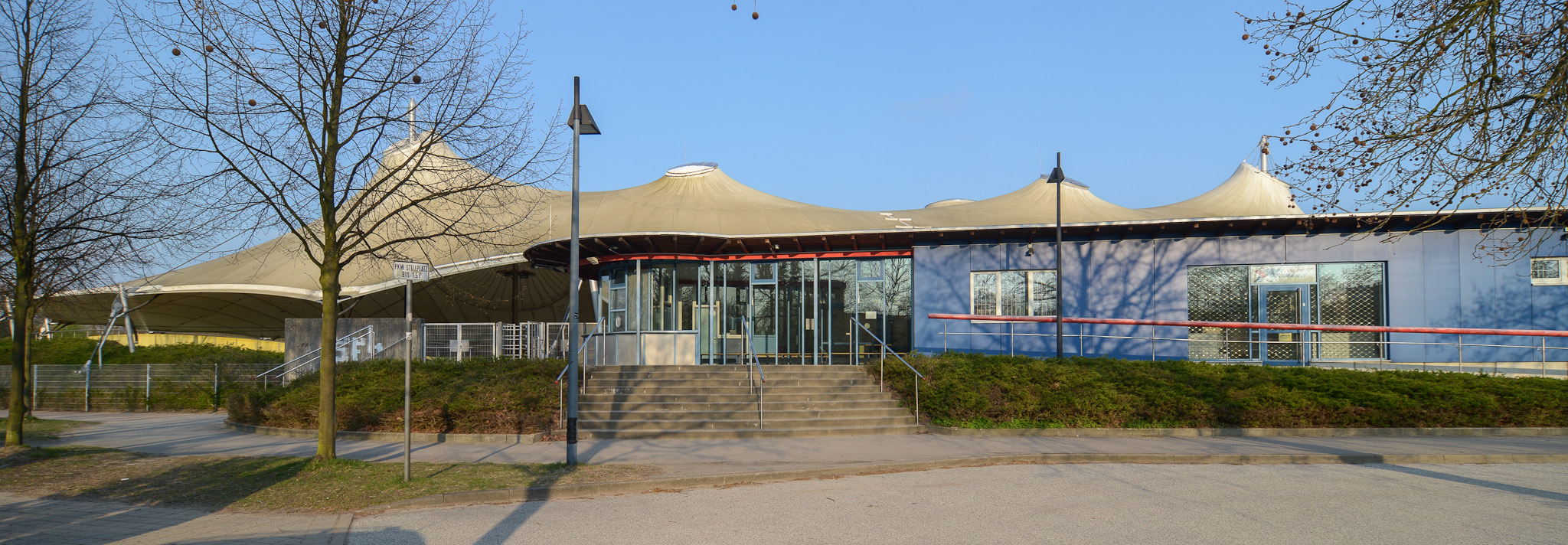 Eingangsbereich